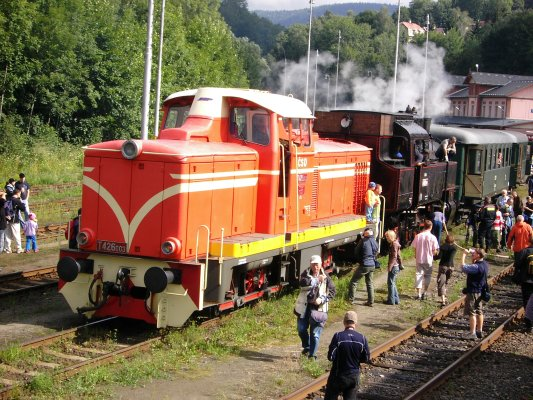 T 426.003 und 423.0145 in Tanvald